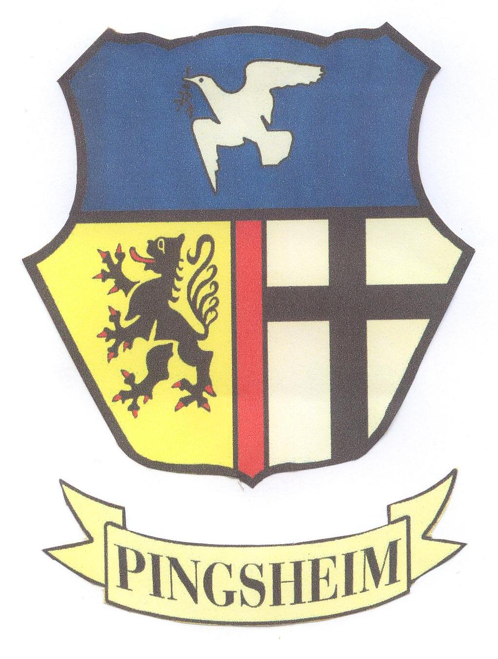 Bevor wieder alle event. URV prüfen: als Pressesprecher der Gemeinde Nörvenich habe ich das Recht, eigene Wappen zu verwenden.--Karl-Heinz Jansen, Nörvenich 12:57, 12. Mär 2006 (CET)